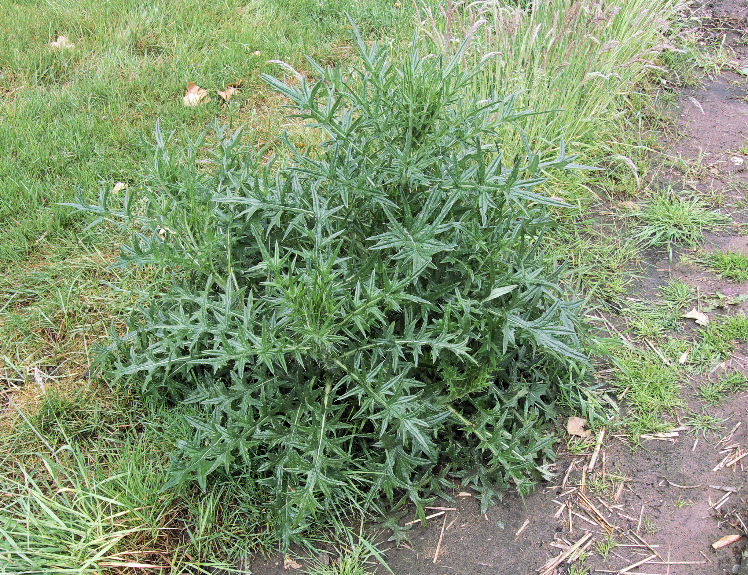 Cirsium vulgare, Speerdistel plant